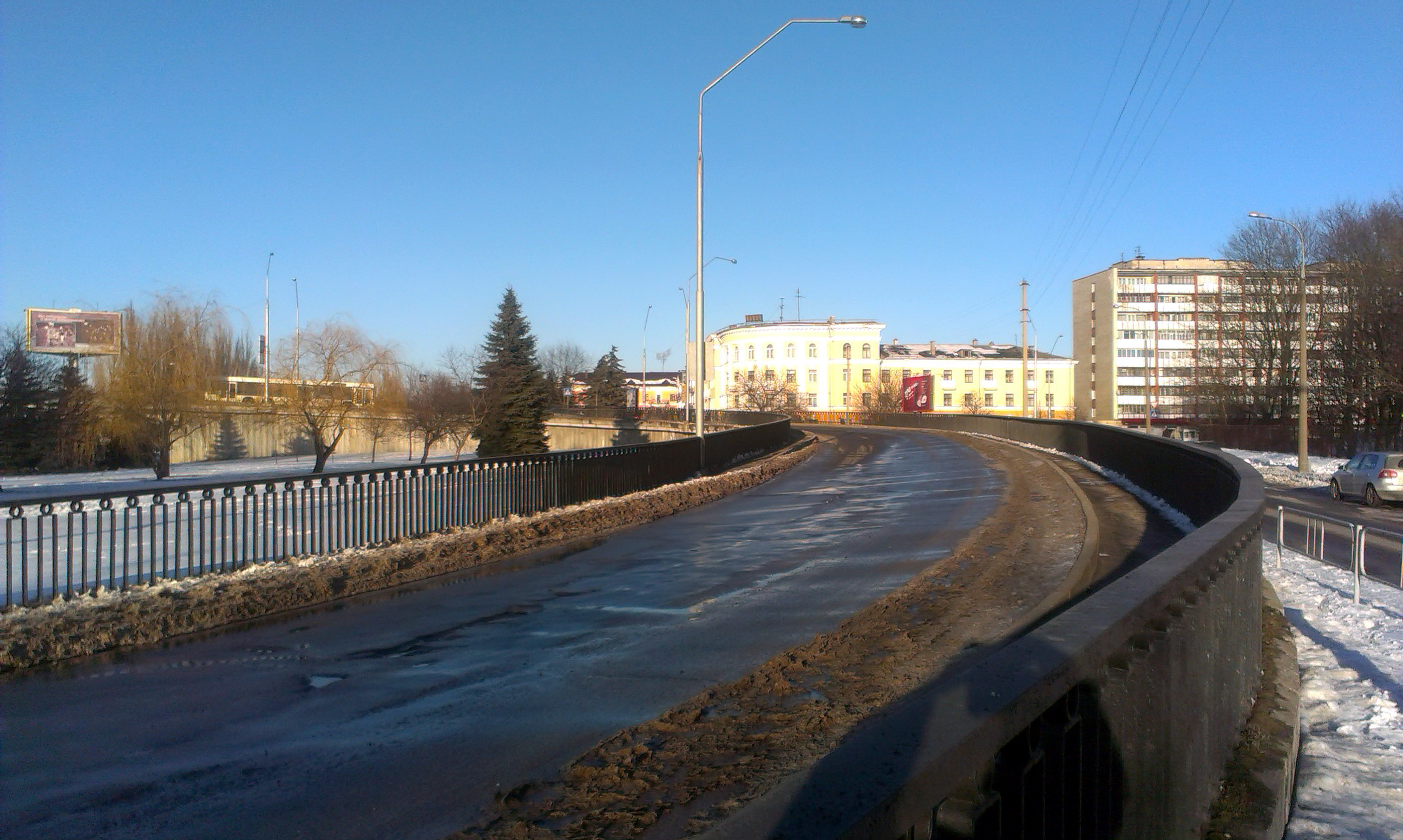 З'езд з маста